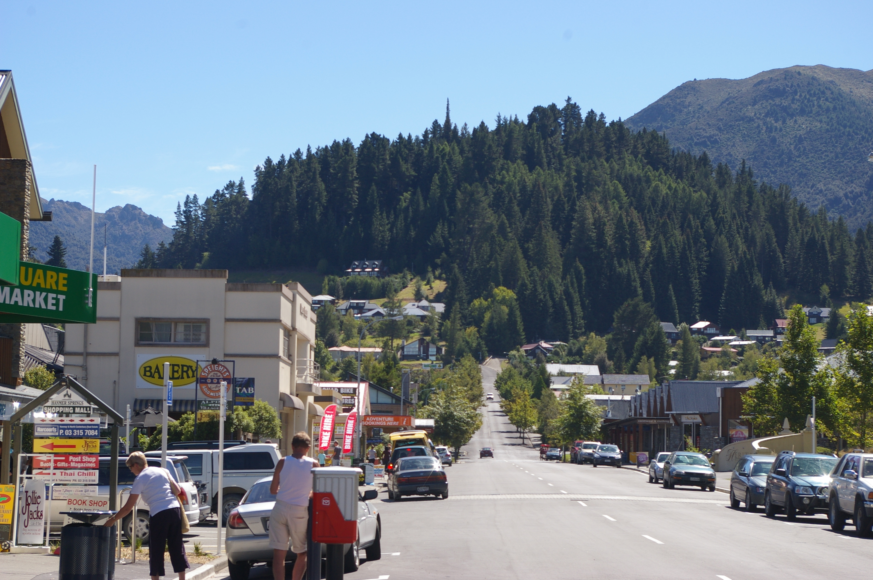 Ausfallstraße in Hanmer Springs